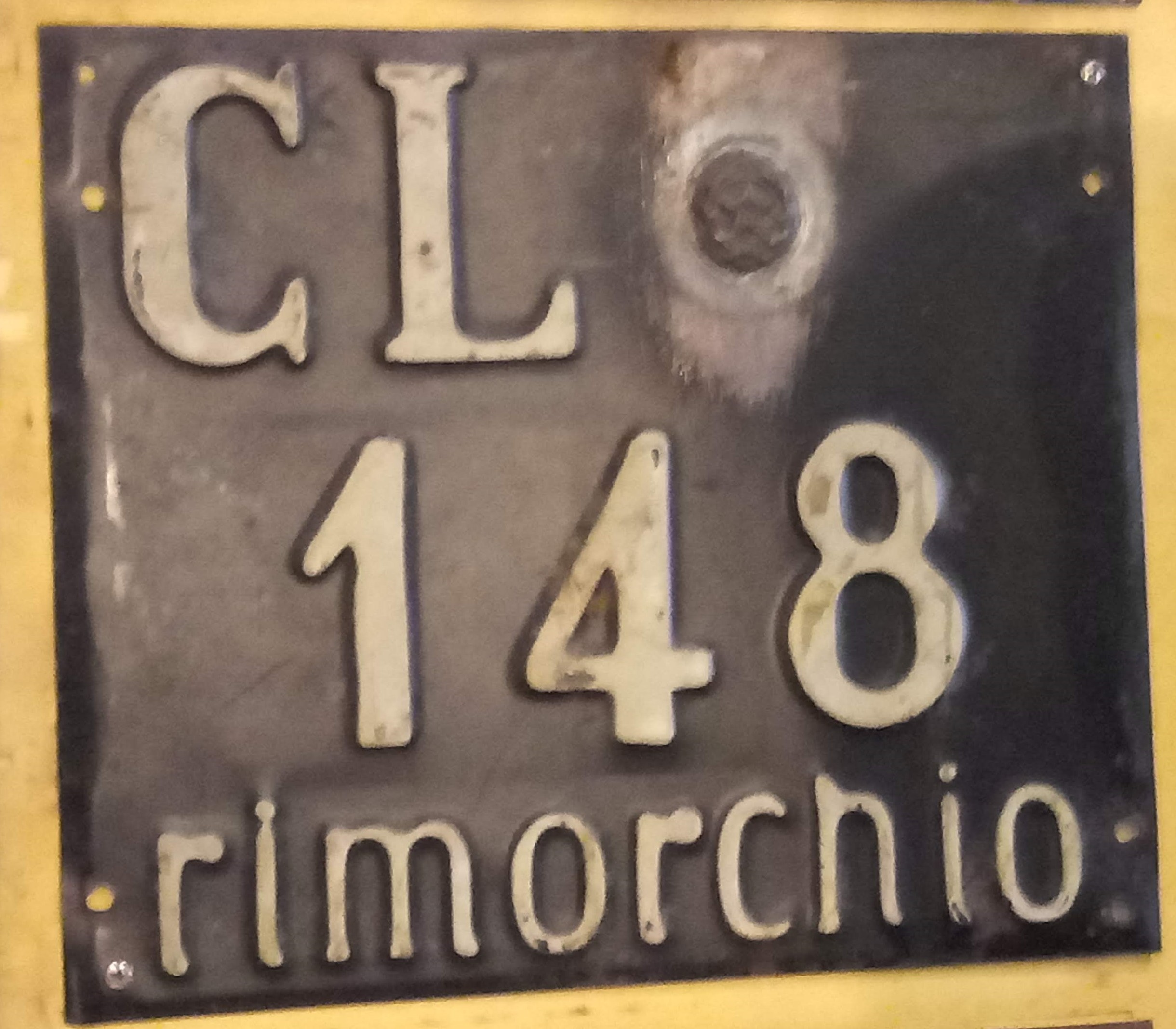 La foto rappresenta la targa di un rimorchio della provincia di Caltanissetta con formato 1932-1959. E' stata scattata in un padiglione di "Auto e moto d'epoca", presso un collezionista di targhe originali e antichizzate, il 26/10/2019